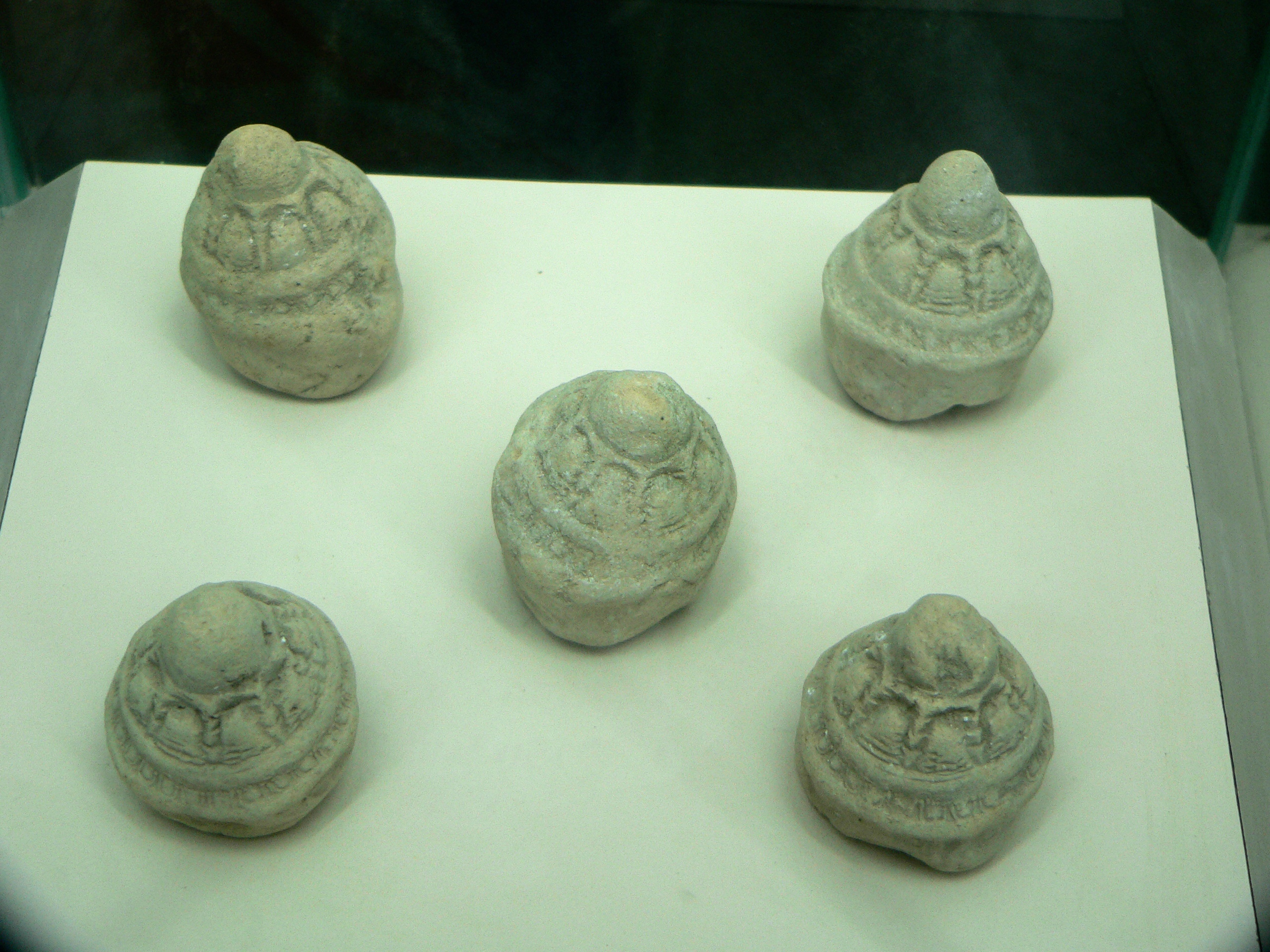 香泥小塔